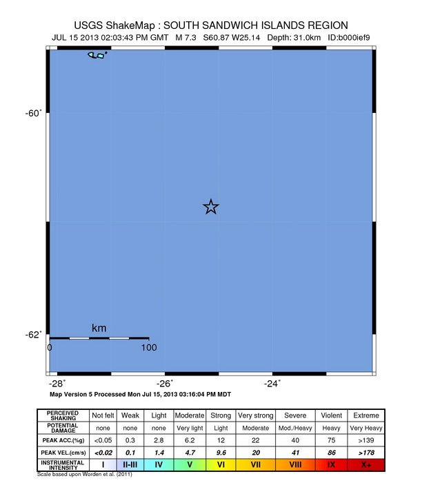 Summary of earthquake 2013-07-15 14:03:43 UTC at U.S. Geological Survey. South Sandwich Islands.